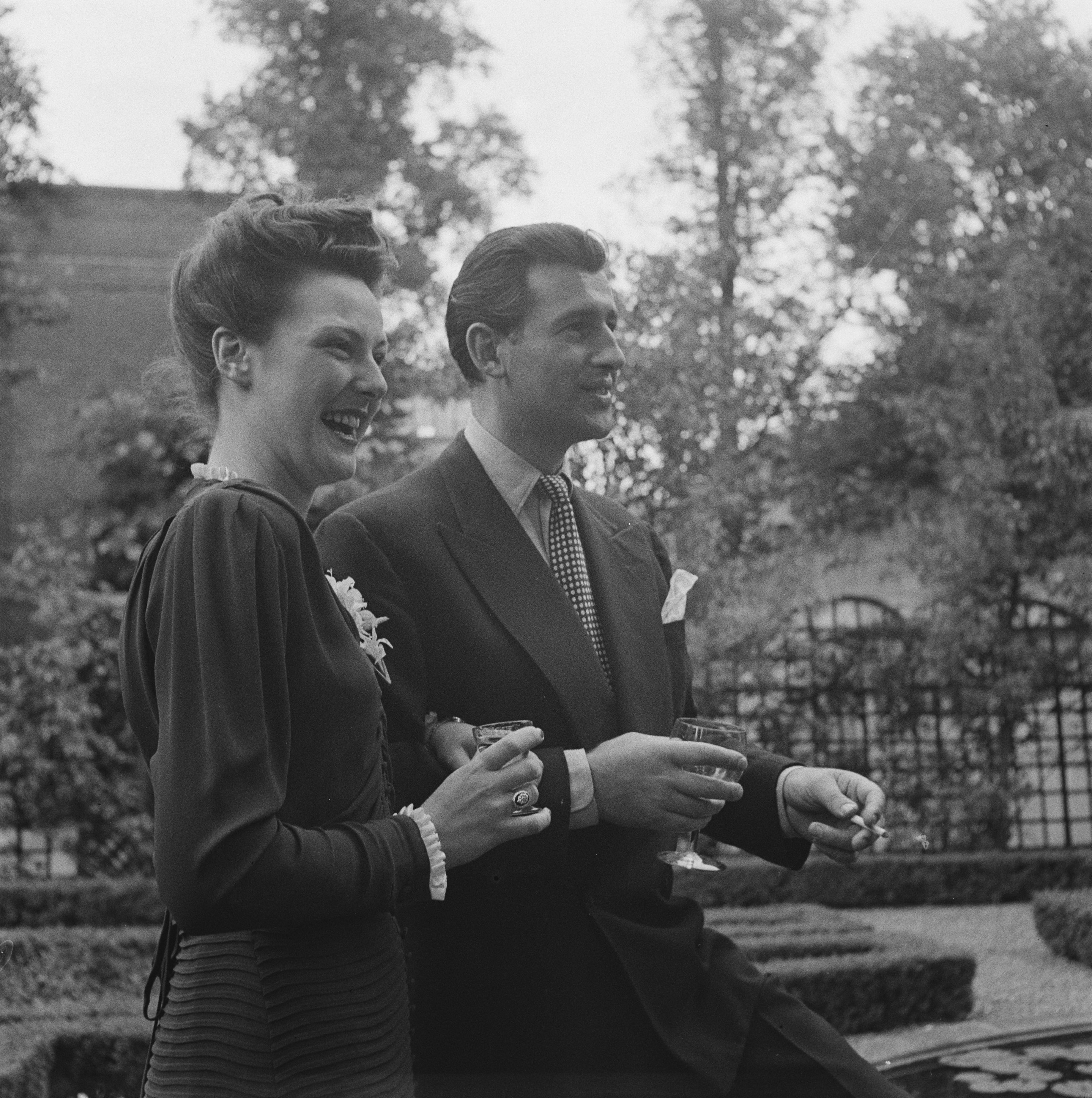 Collectie / Archief : Fotocollectie Anefo Reportage / Serie : [ onbekend ] Beschrijving : Steward Grainger Cocktail party Eagle Lion Datum : 4 juli 1946 Trefwoorden : PARTY Persoonsnaam : EAGLE LION, granger steward Fotograaf : Haren Noman, Theo van / Anefo Auteursrechthebbende : Nationaal Archief Materiaalsoort : Negatief (zwart/wit) Nummer archiefinventaris : bekijk toegang 2.24.01.03 Bestanddeelnummer : 901-8419